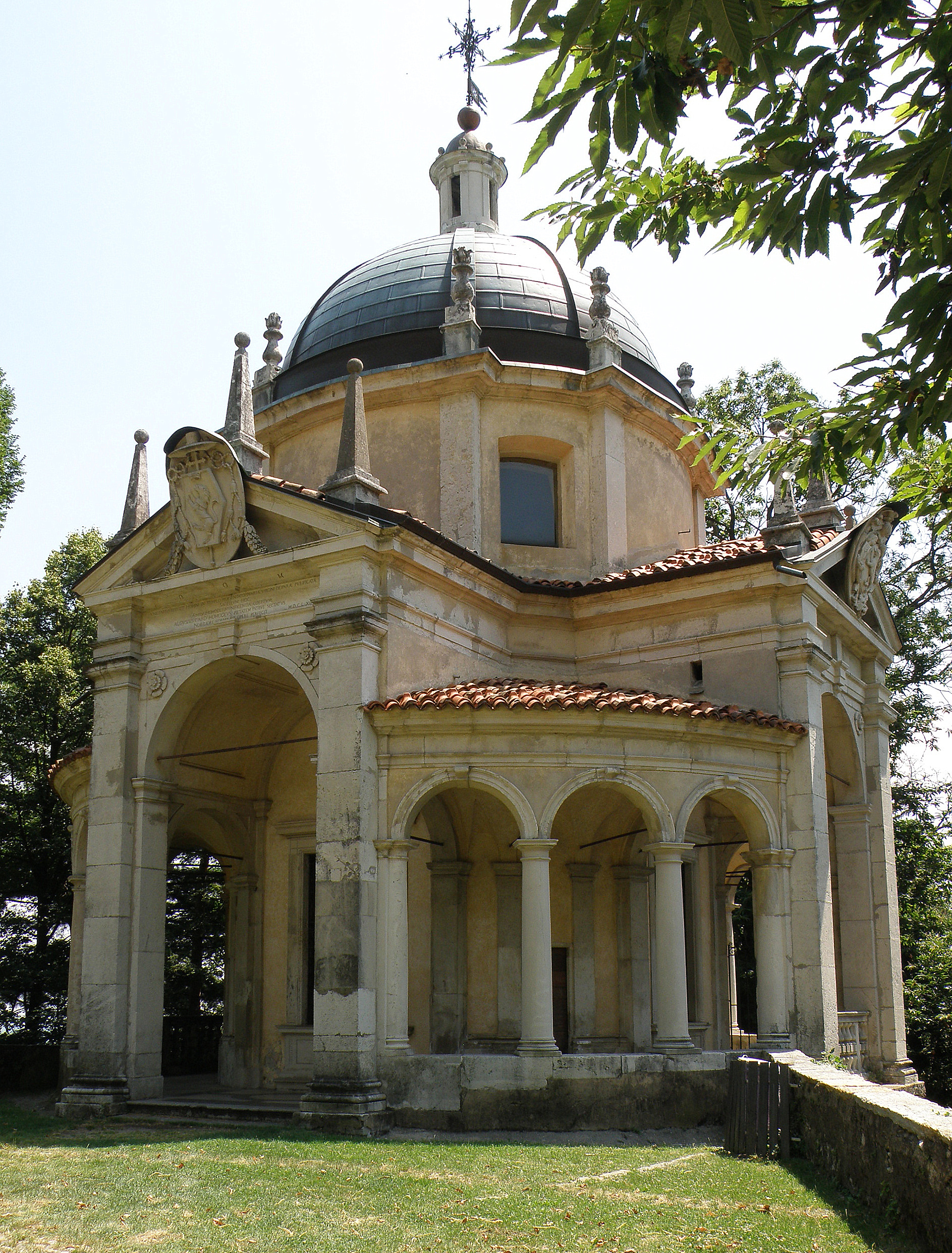 Sacro Monte di Varese: IV Cappella, Presentazione di Gesù al tempio.